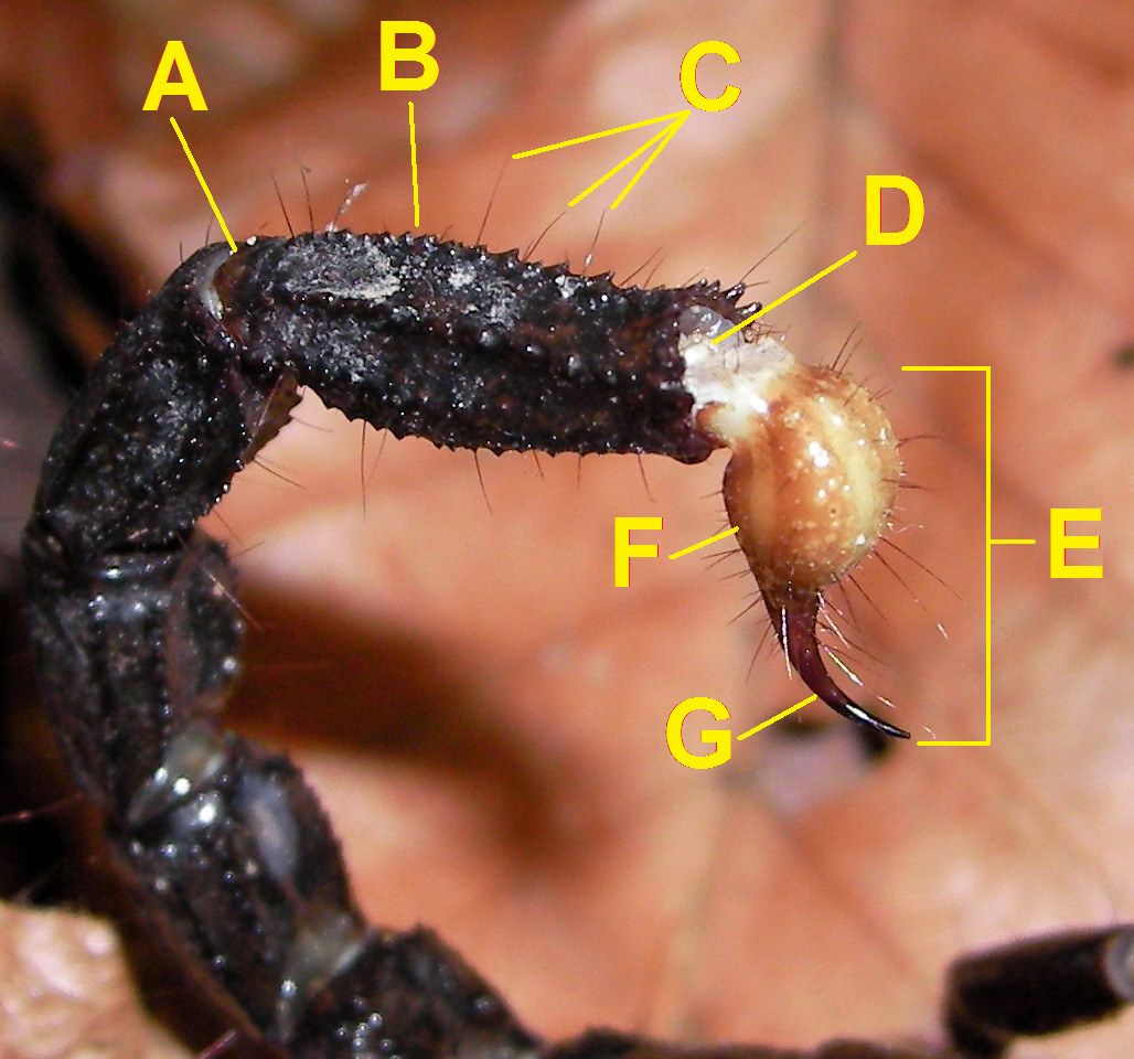 Pandinus imperator, Giftstachel